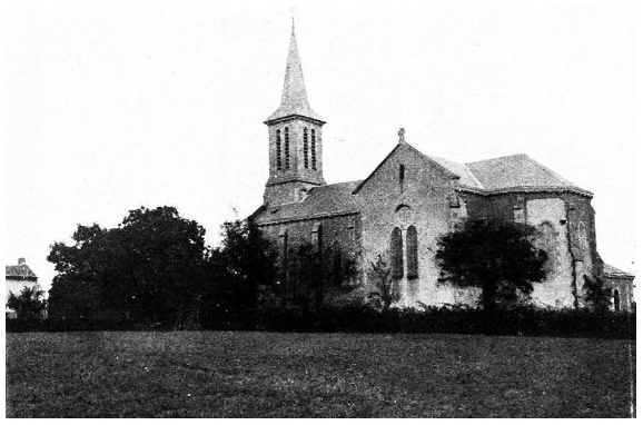 Montravers est un village du nord Deux-Sèvres